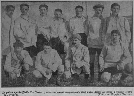 Pro Vercelli 1910-11